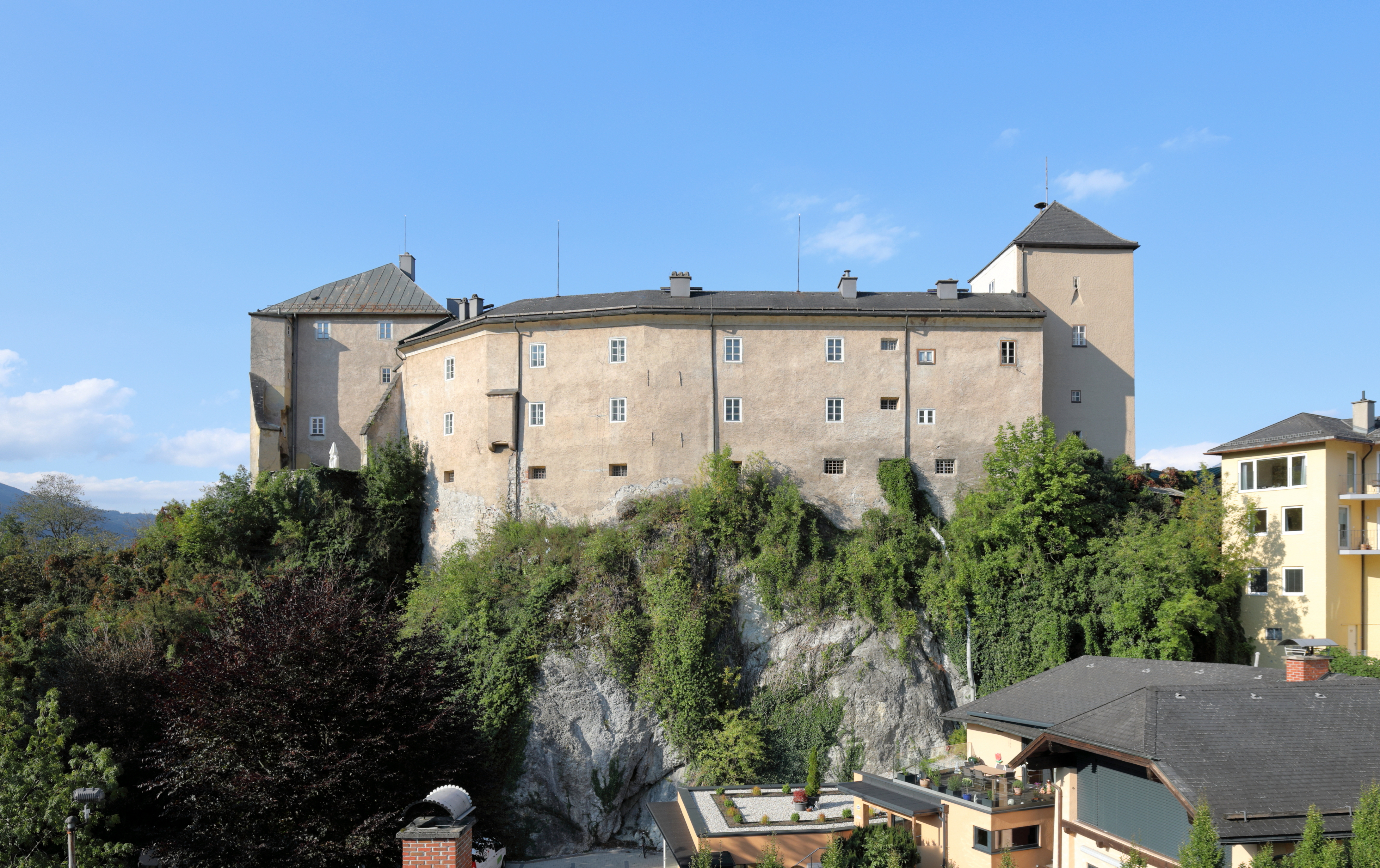 Südansicht der Burg Golling in der Salzburger Marktgemeinde Golling an der Salzach.